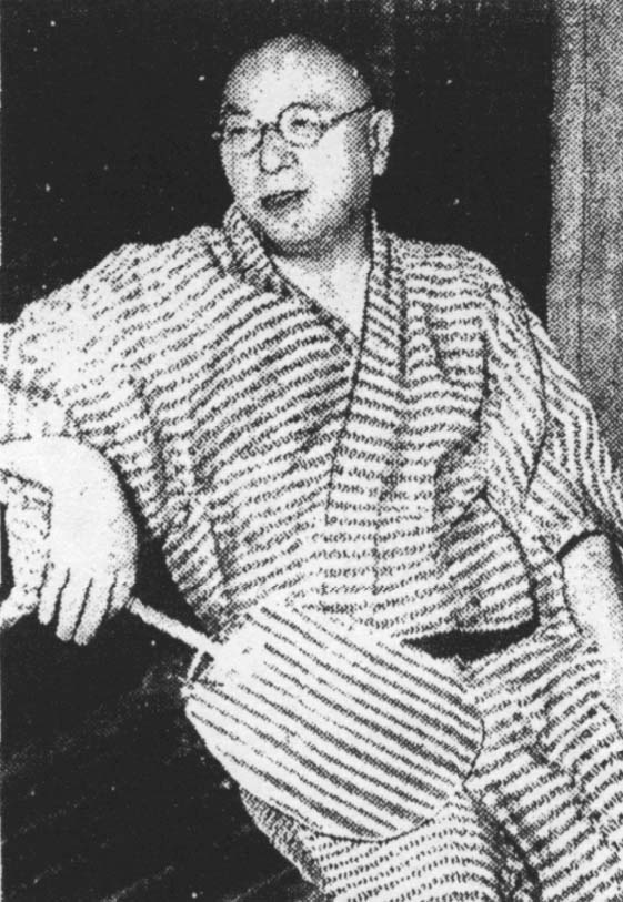 兵庫県知事公舎でインタビューに応じる岸田幸雄